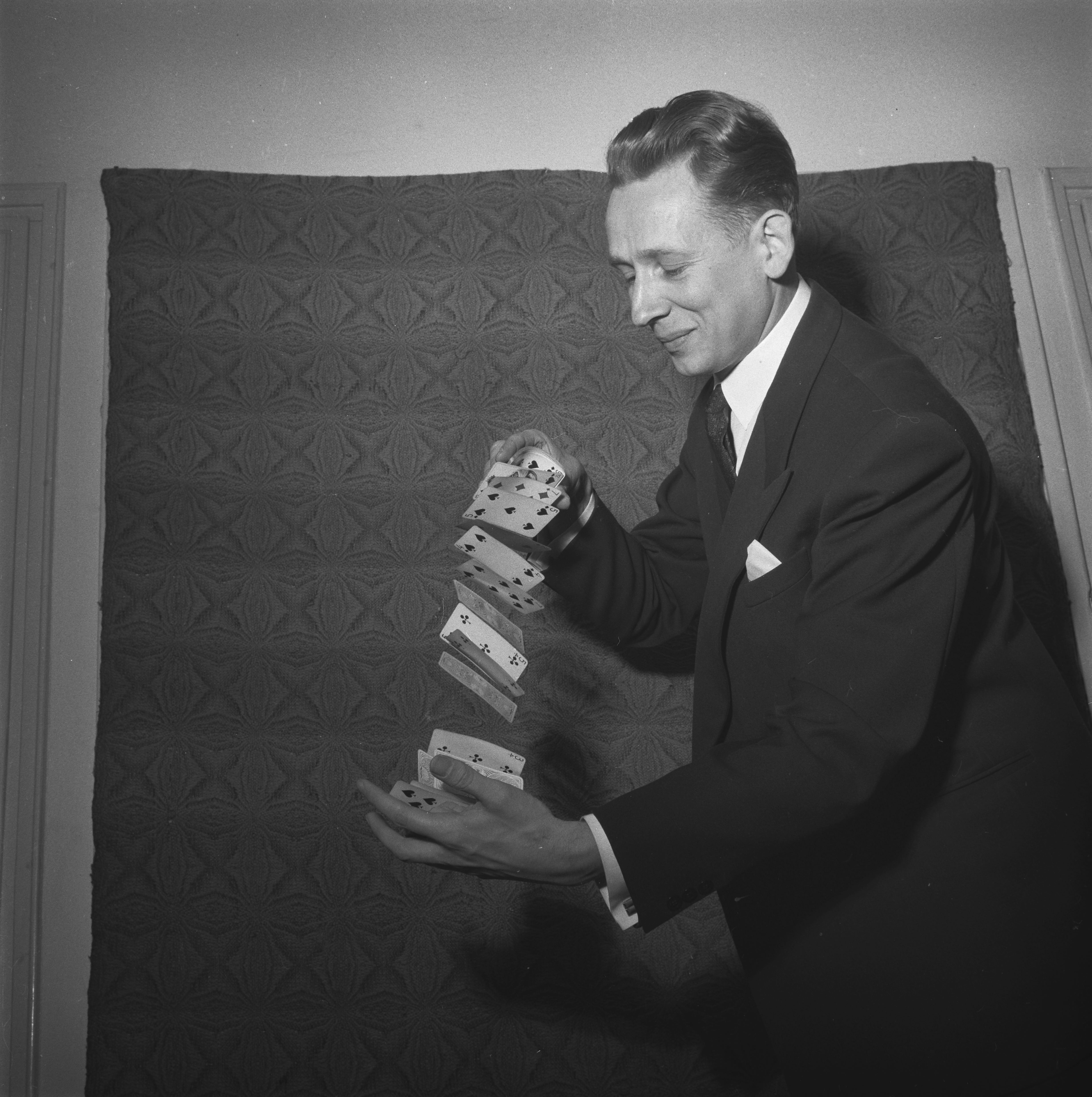 Taikuri Solmu Mäkelä (1922–2018) esiintymässä Salossa